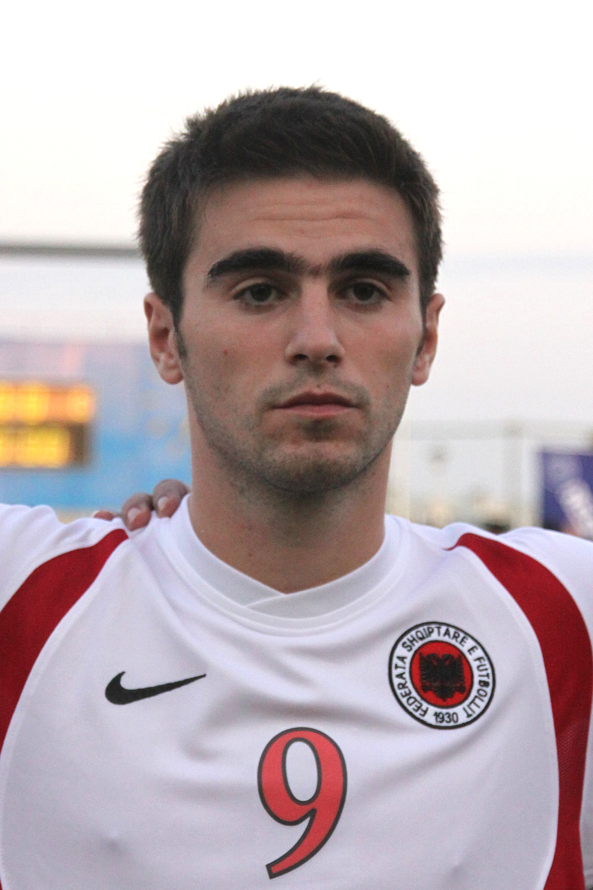 Ahmed Yanuzi (FC Vorskla Poltava) - Albania national under-21 football team (1)